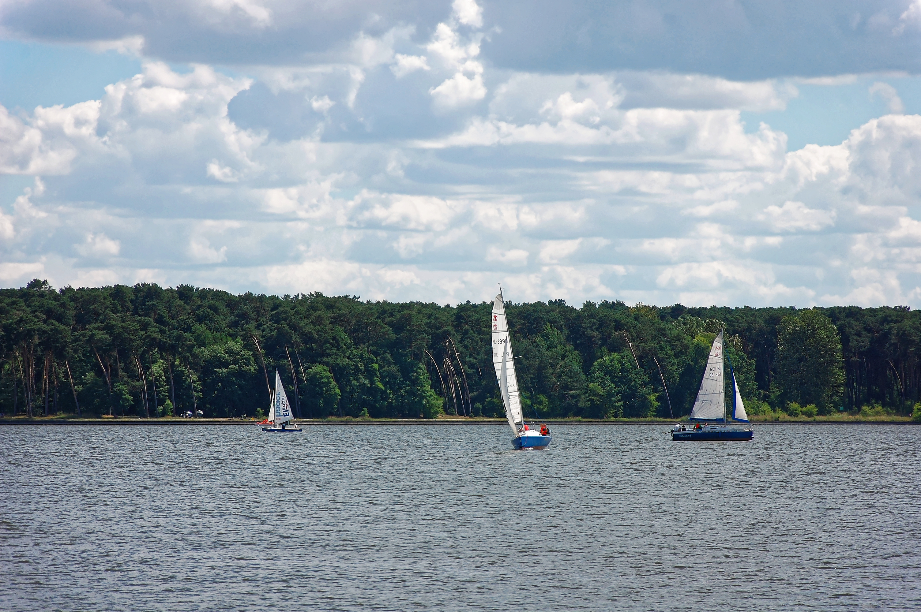 Zalew Zemborzycki w Lublinie